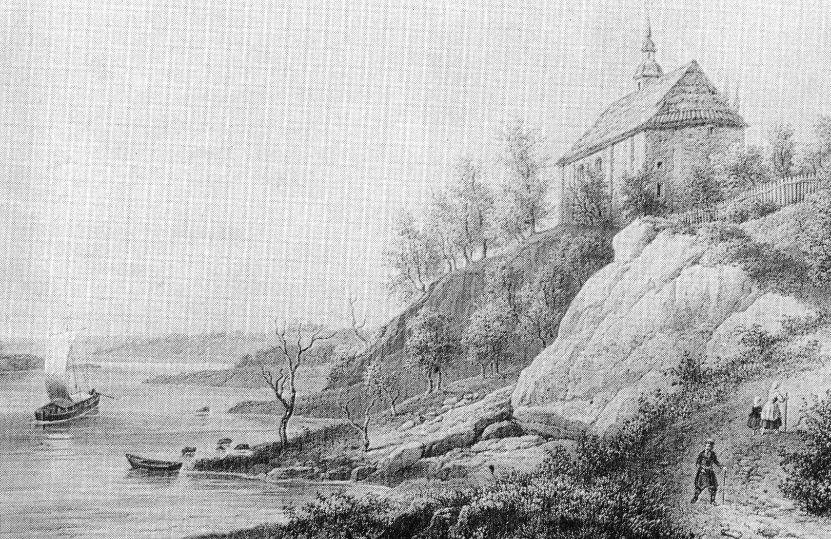 The Church in the Belarusian city of Grodno. Painting Mikhail Kuleshov